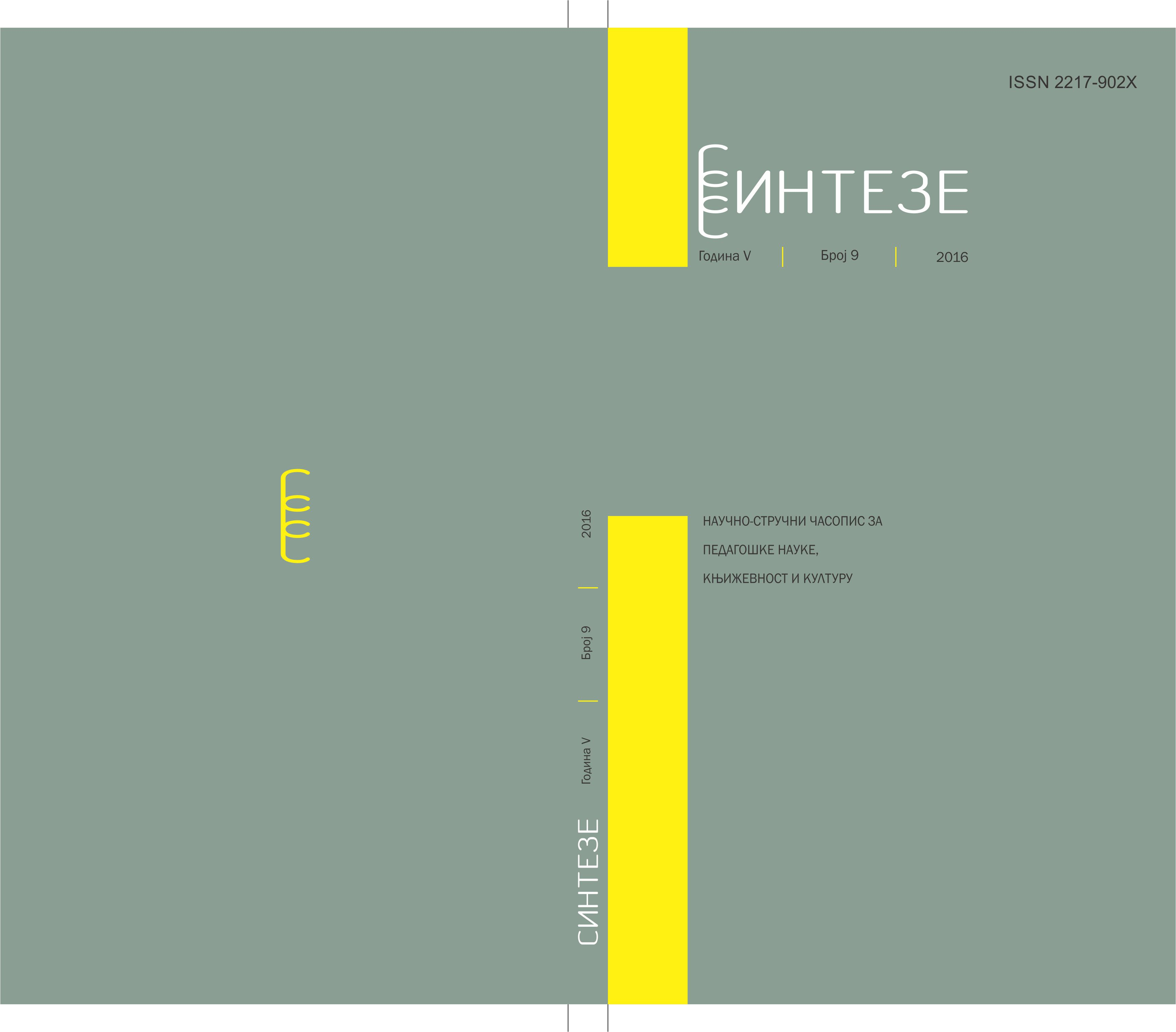 Sinteze prednja korica